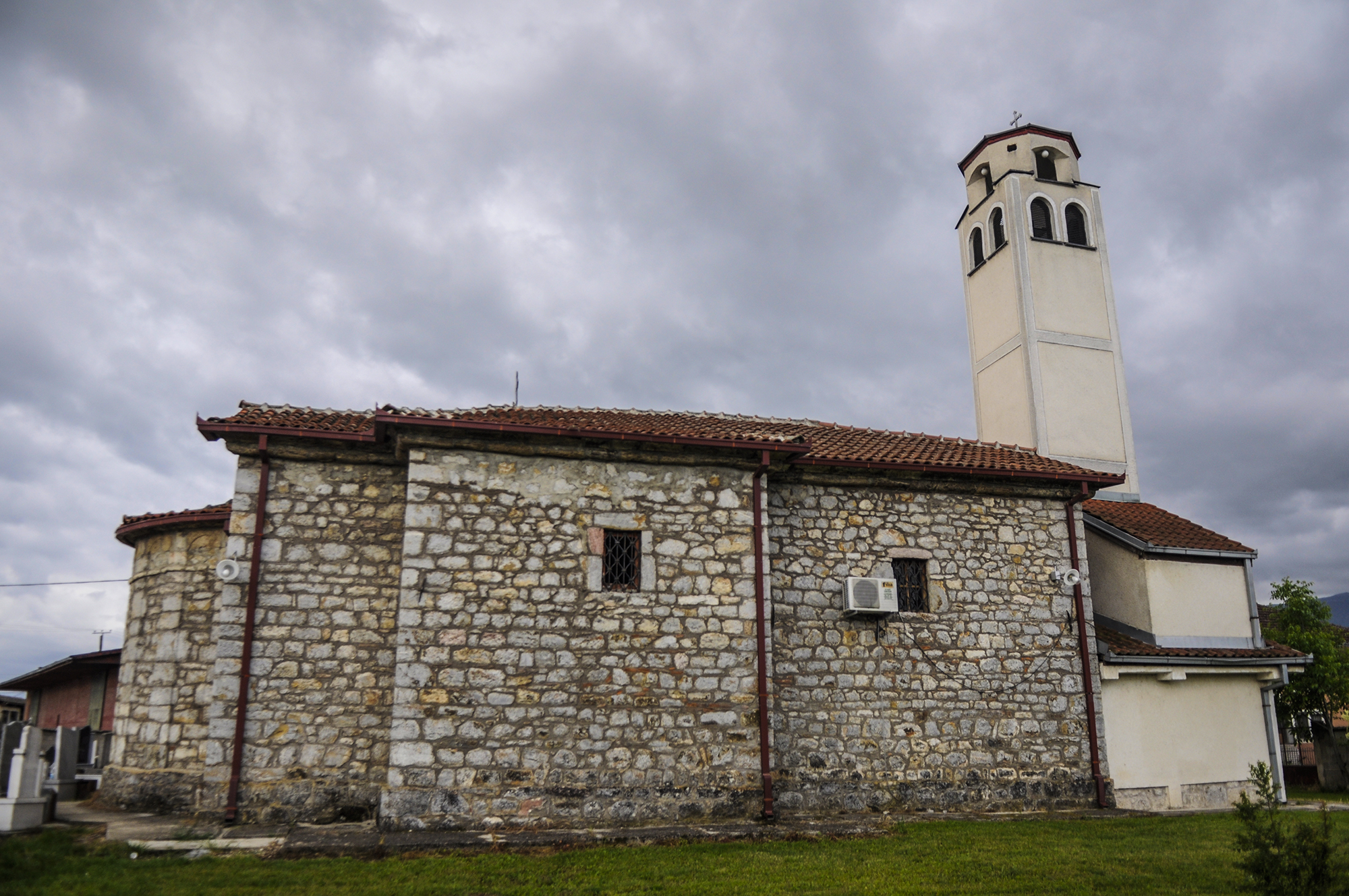 Црква „Св. Власиј“ - главната селска црква (осветена околу 1893 година)